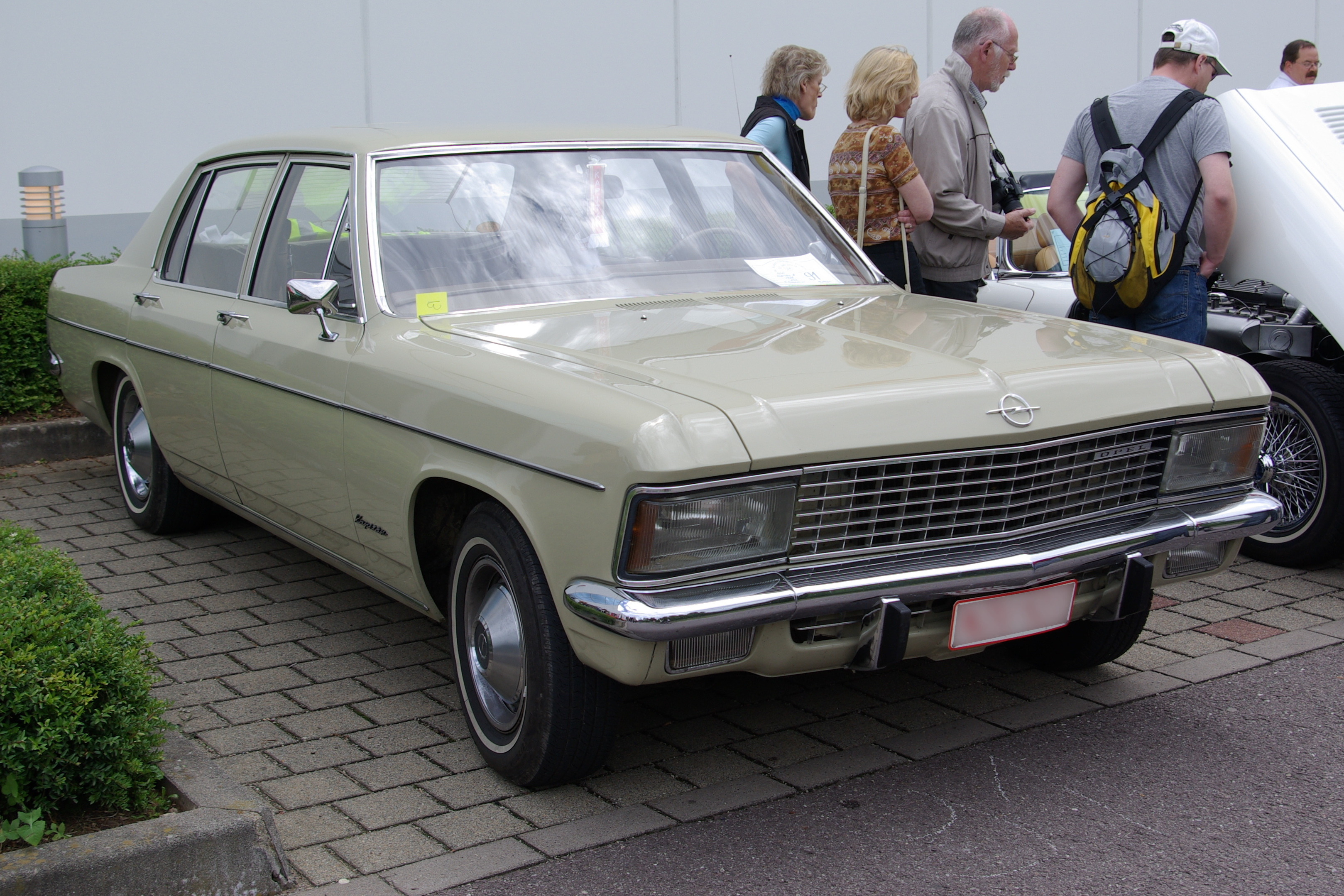 Opel Kapitän B Baujahr 1969 Leistung 132 PS